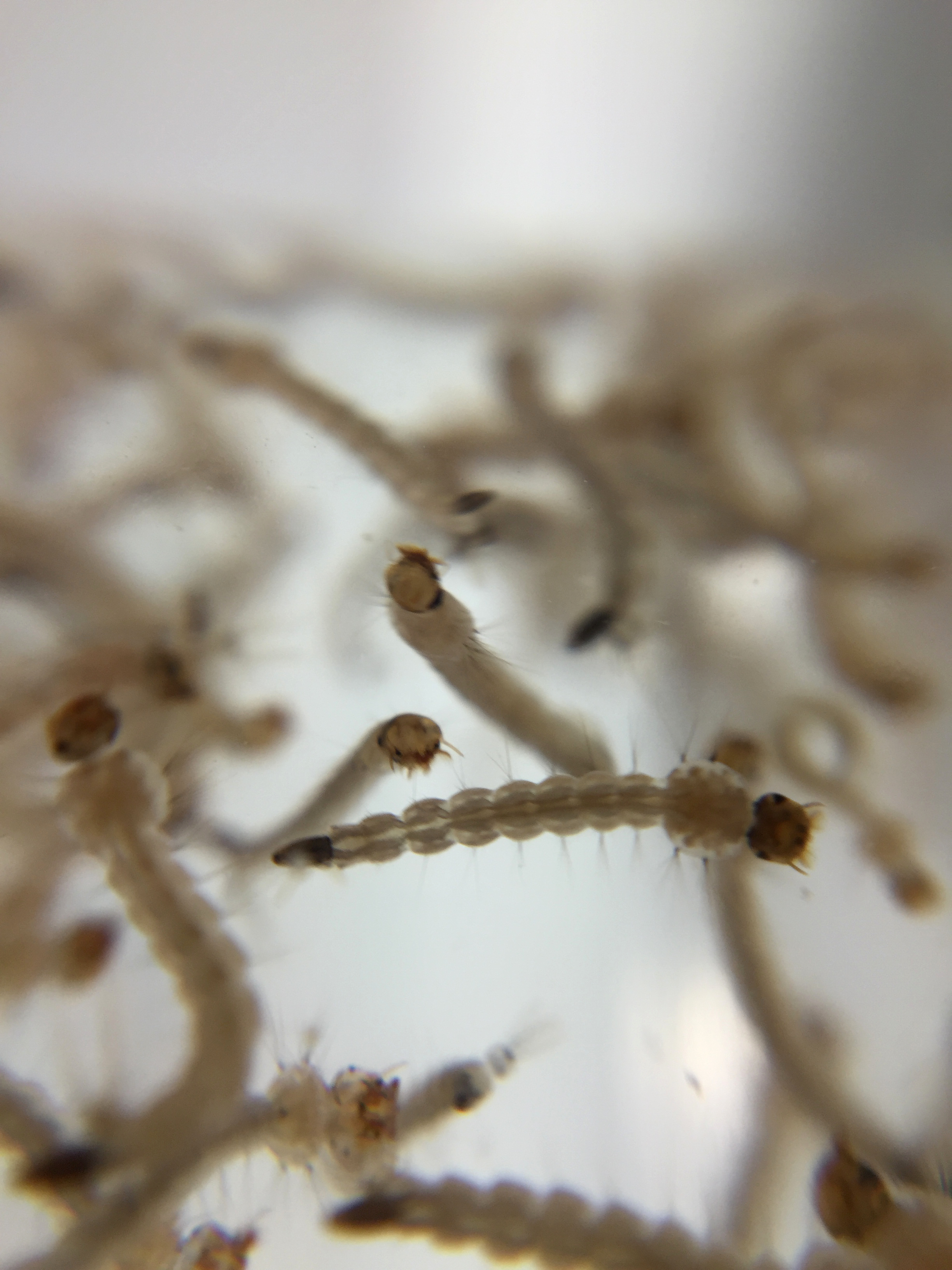 Aedes aegypti mosquito larvae. Credit: NIAID